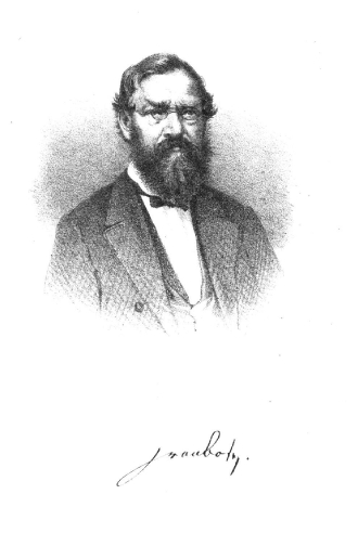 Porträt Curt von Bose